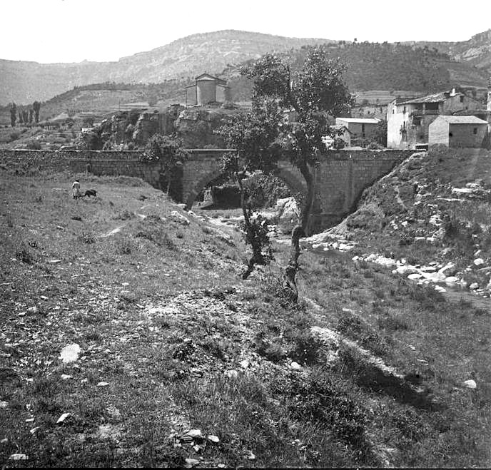 Vista de l'Abella d'Osona. Josep Salvany i Blanch (1914)